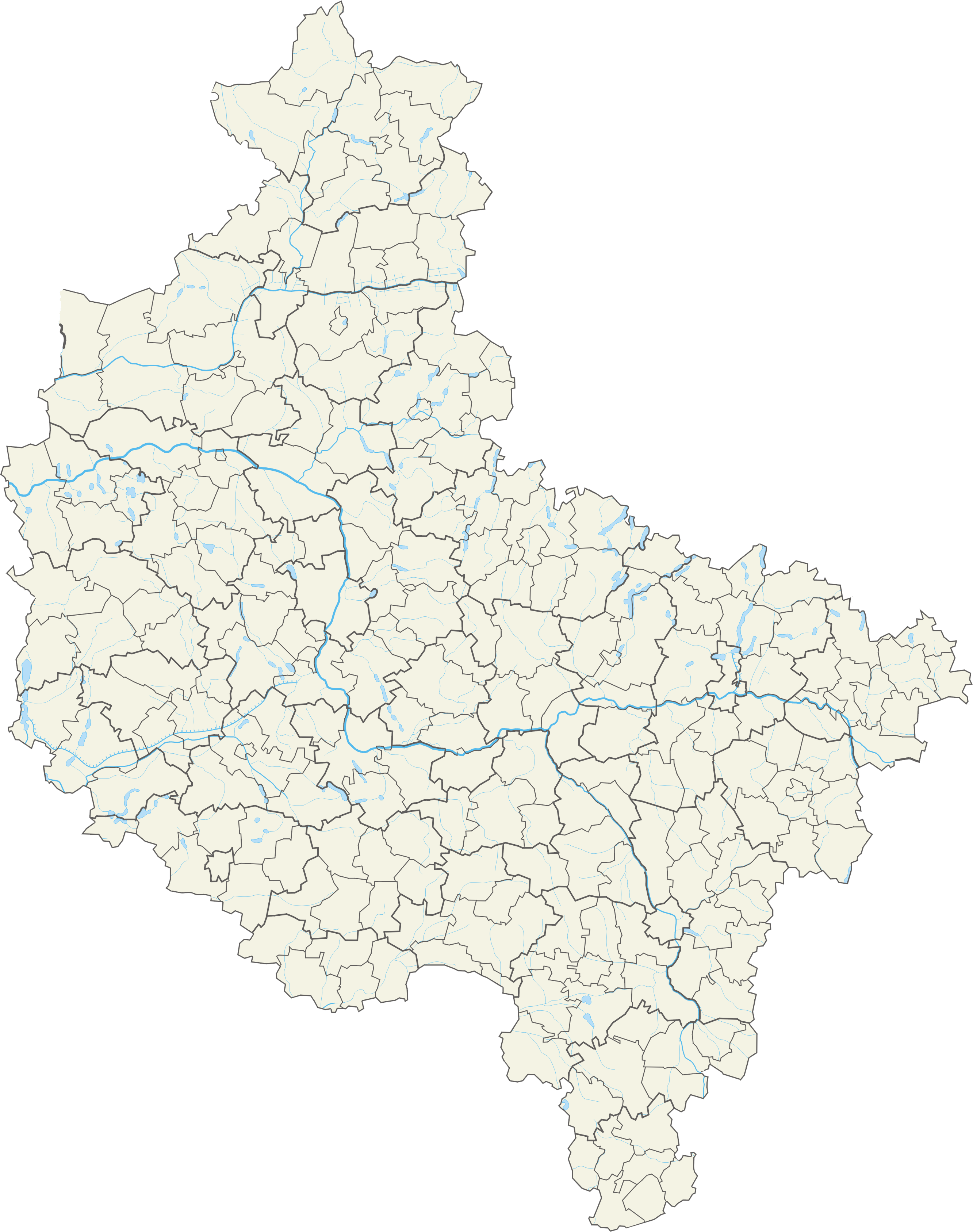 Województwo wielkopolskie – powiaty i gminy Współrzędne graniczne mapy: N: 53.6558° N S: 51.1037° N W: 15.7765° E E: 19.1050° E